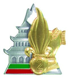 Insigne régimentaire du 2e Régiment étranger de génie